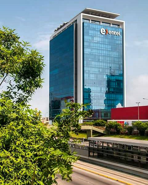 Esta fotografía es de la torre Entel en Lima, Perú en la avenida Paseo de la Republica con Via Expresa en San Isidro